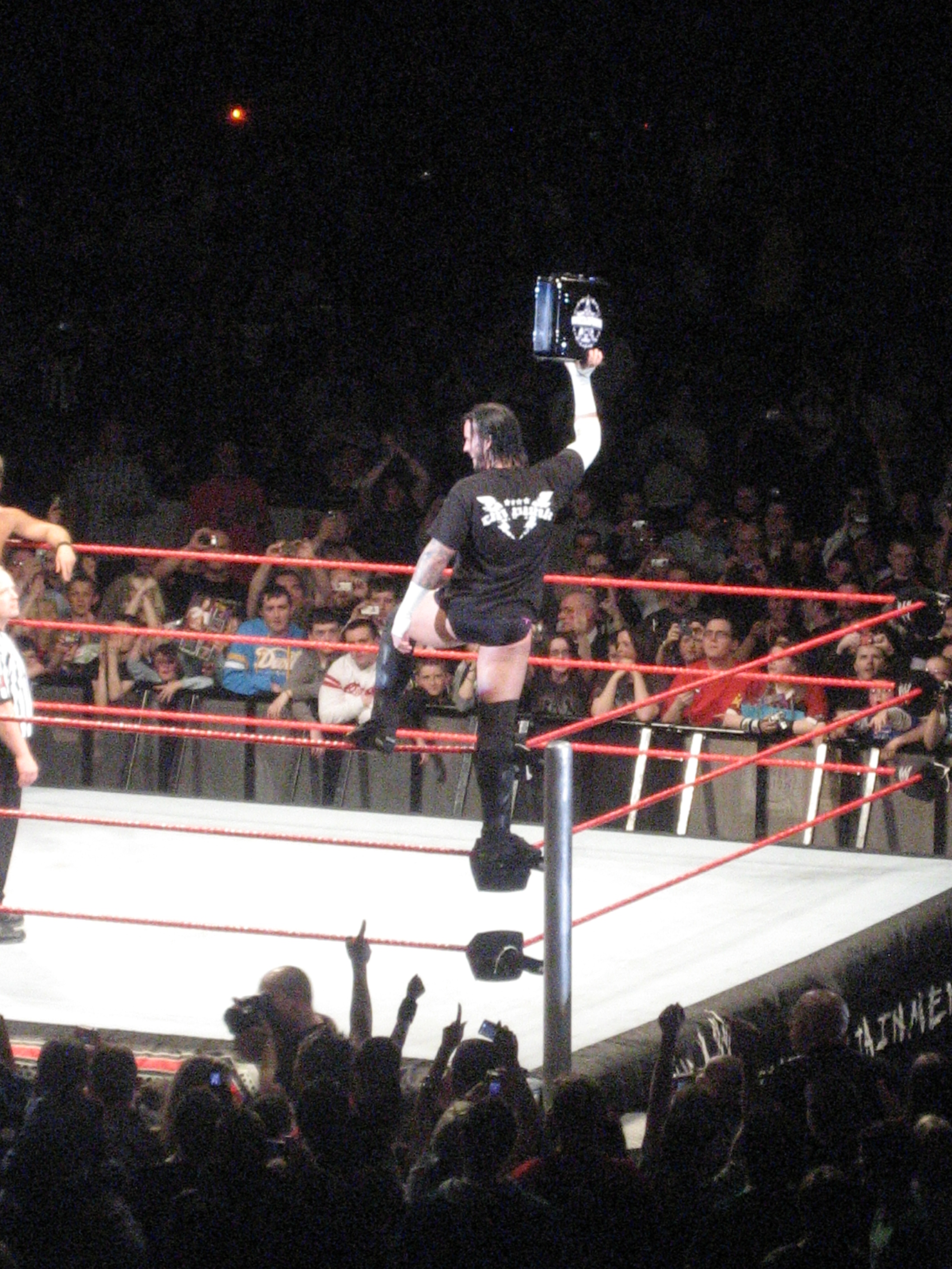 Punk con su maletín del Money in the Bank en 2009.